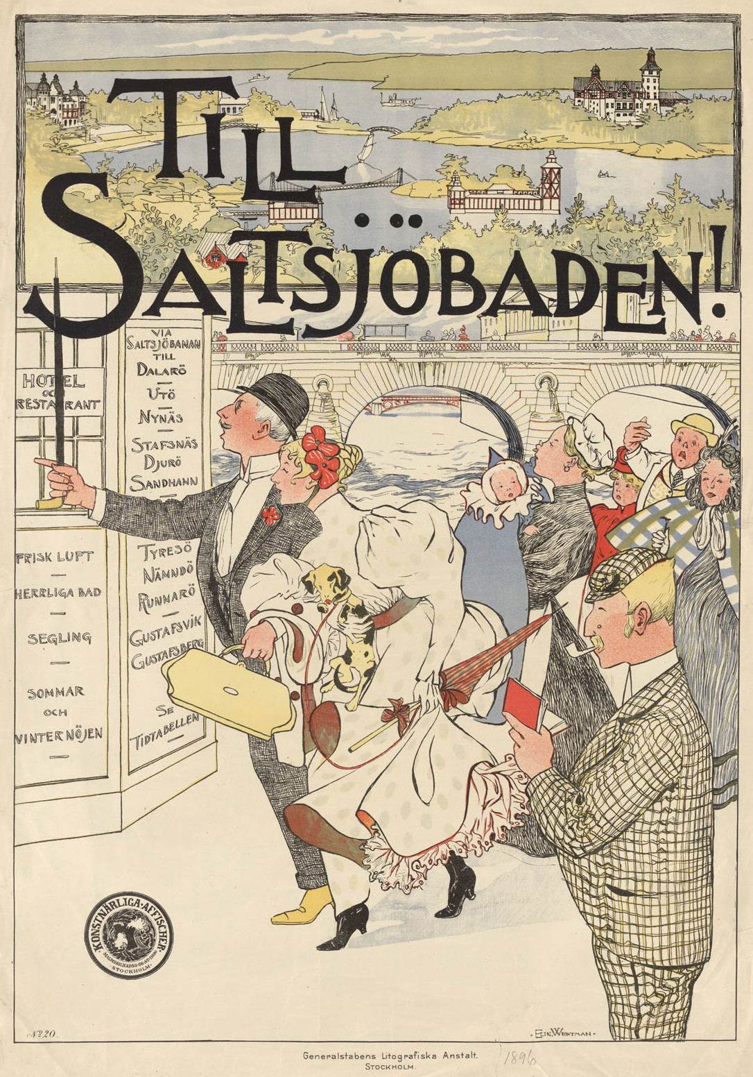 Till Saltsjöbaden [Affisch]. Se vidare länken.